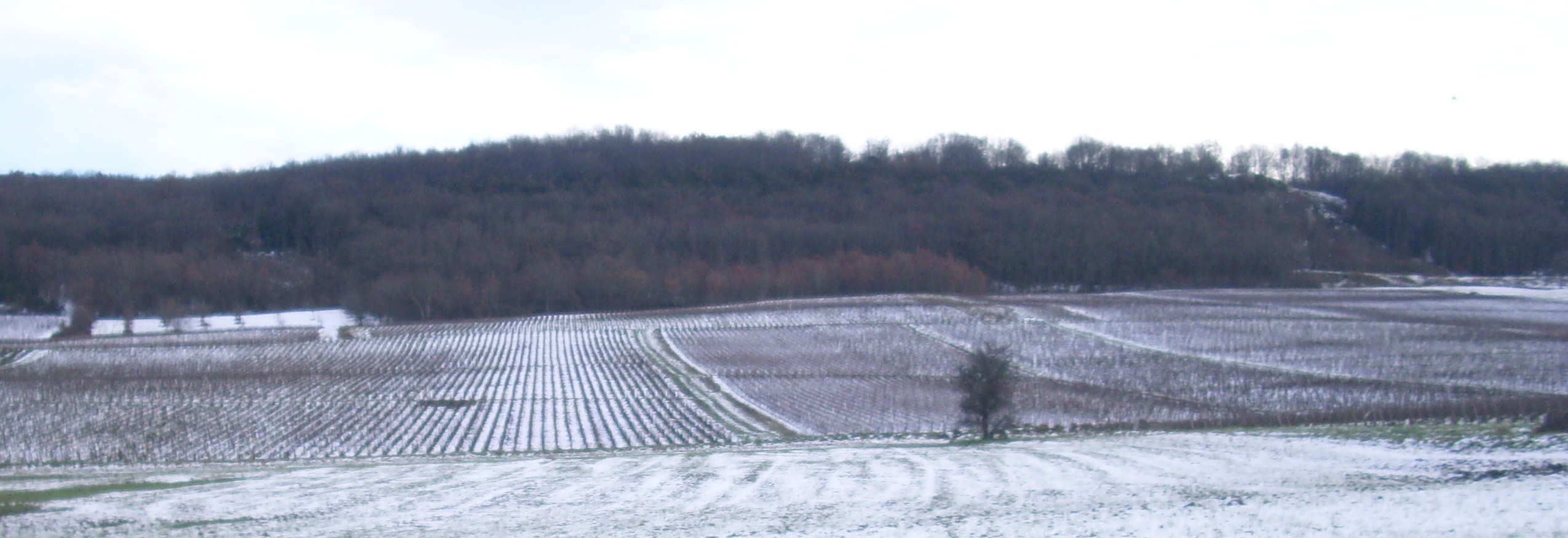 Vignes à Saint-Denis-de-Vaux (71)